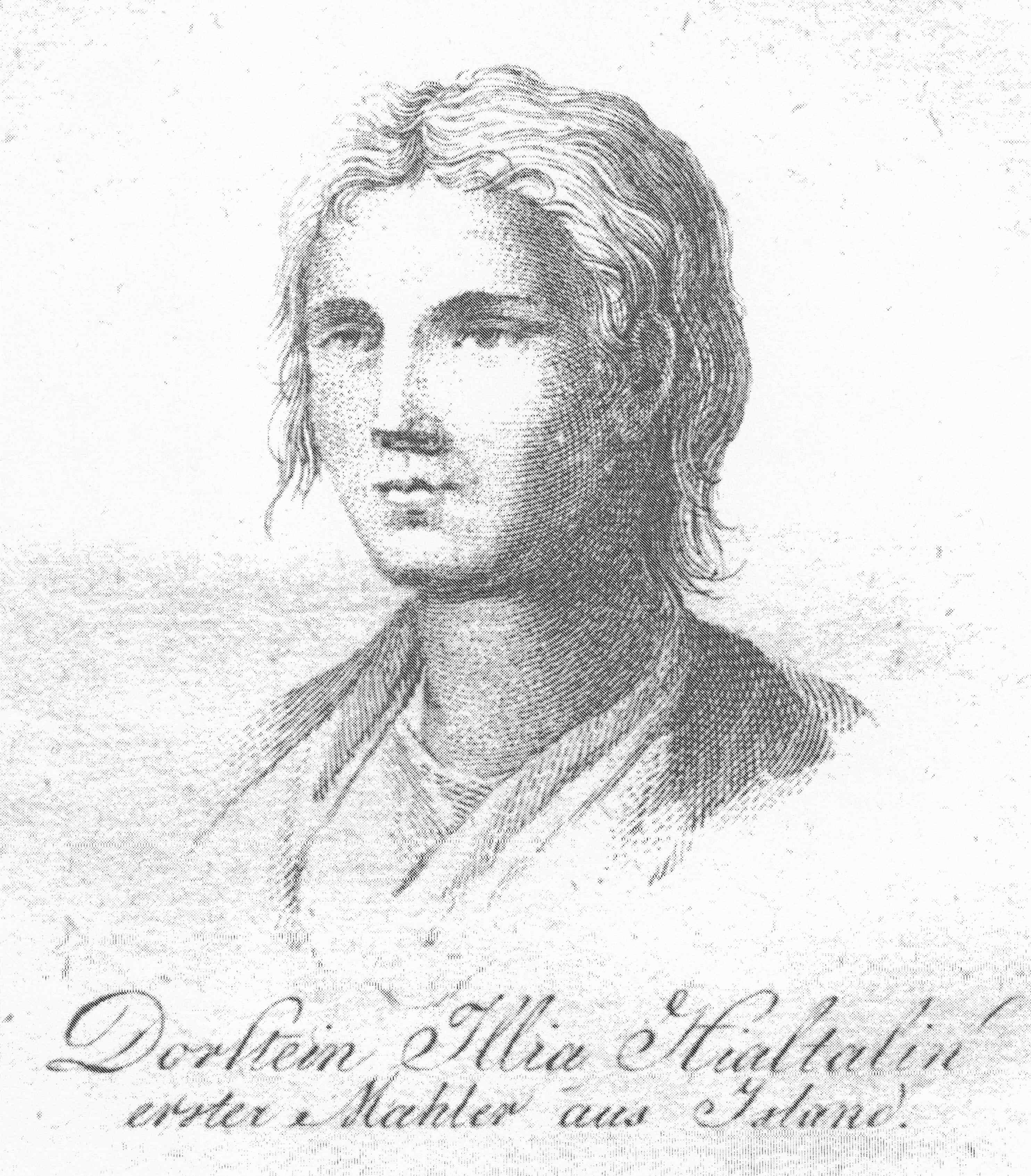 Dorstein Illias Hialtalin (1771–1817) um 1804, isländischer Miniaturen- und Landschaftsmaler der Stobwasserschen Lackwarenmanufaktur in Braunschweig.